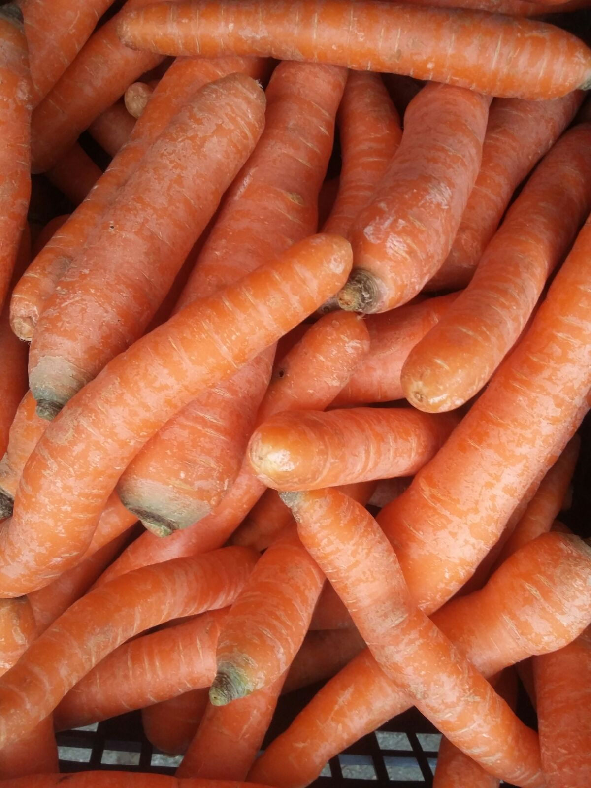 Свежа шаргарепа